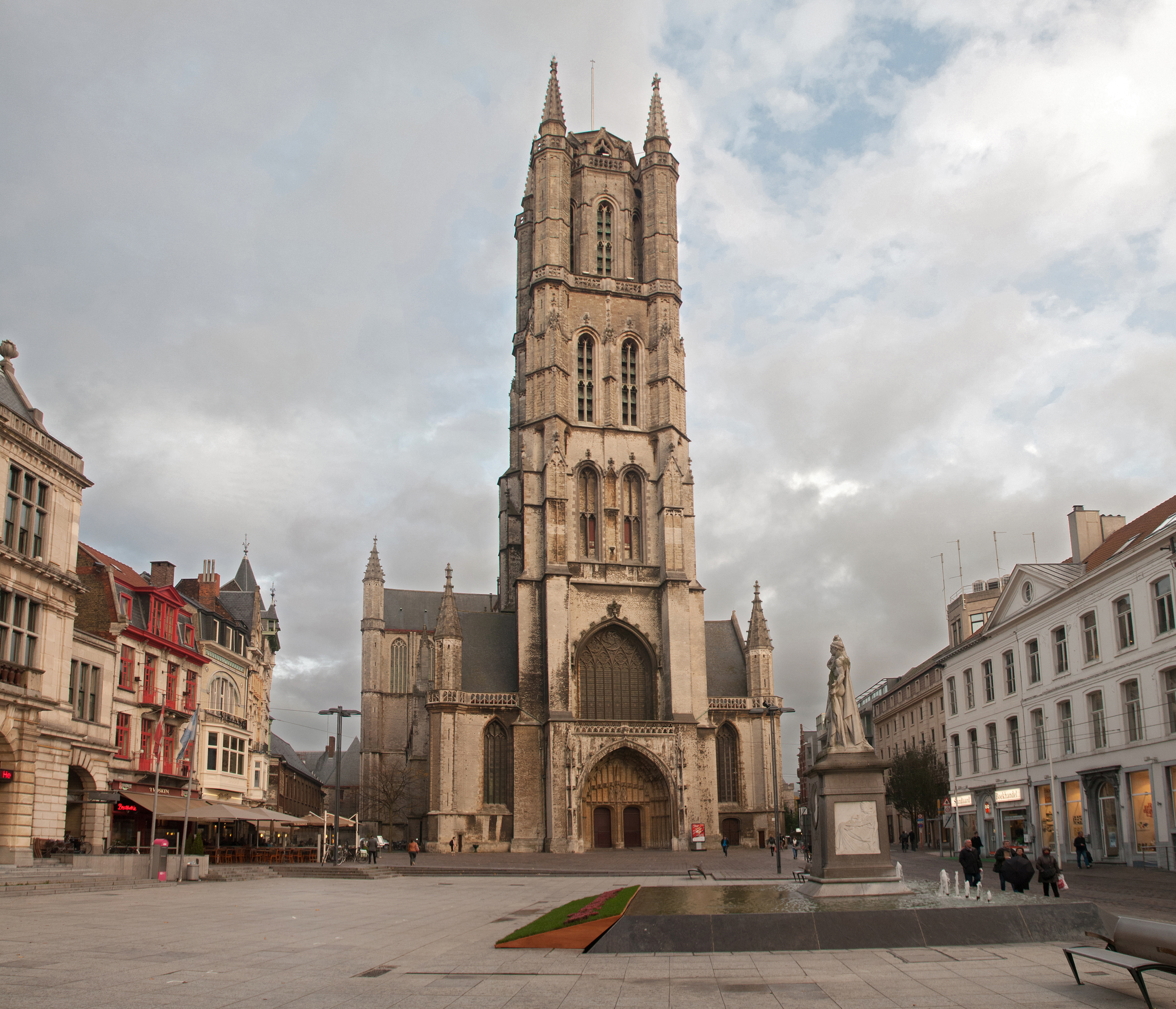 Sint-Baafskathedraal, Gent.